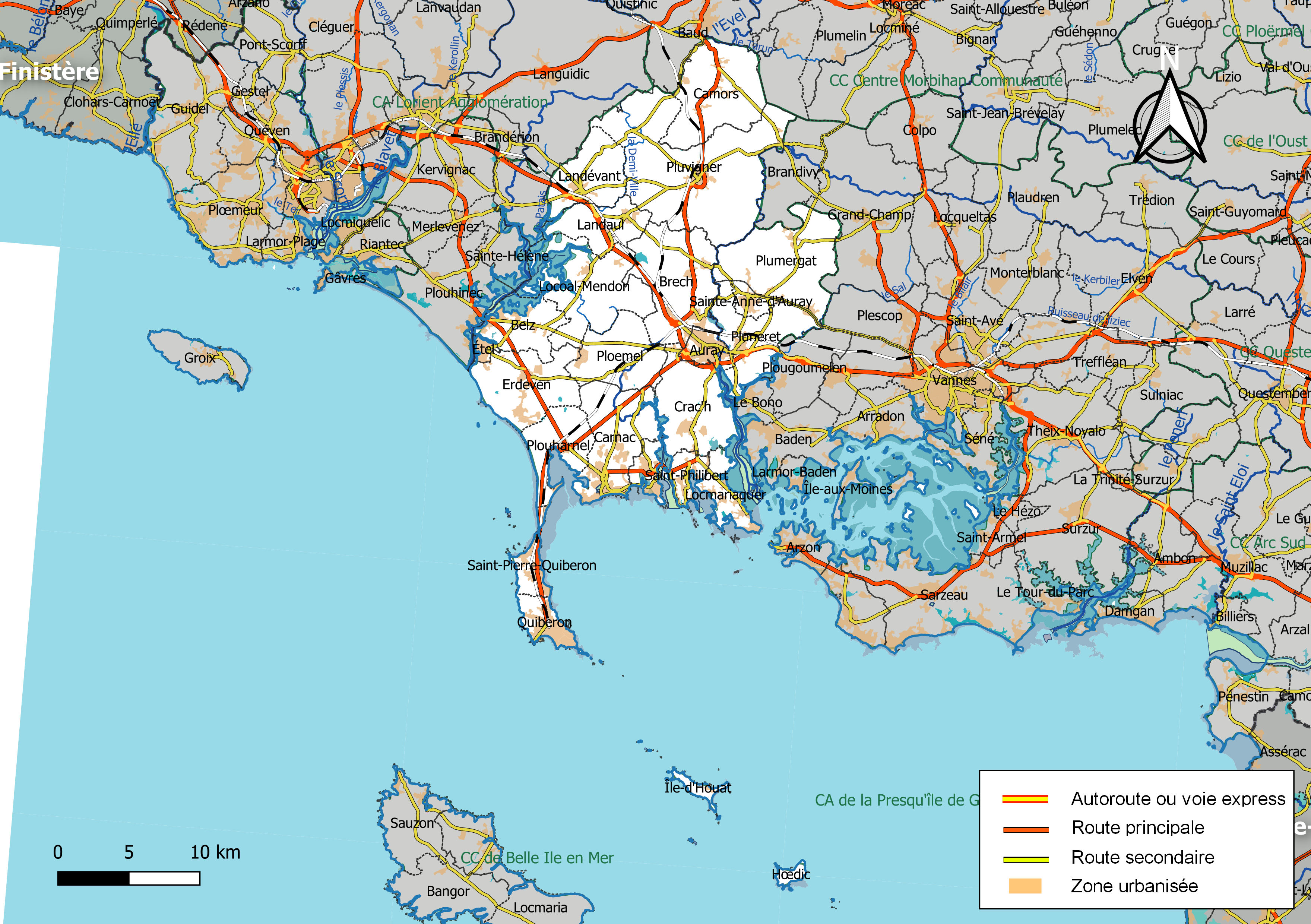 Carte géographique de l'intercommunalité Auray Quiberon Terre Atlantique, département du Morbihan, France. Composition au 1er janvier 2019.